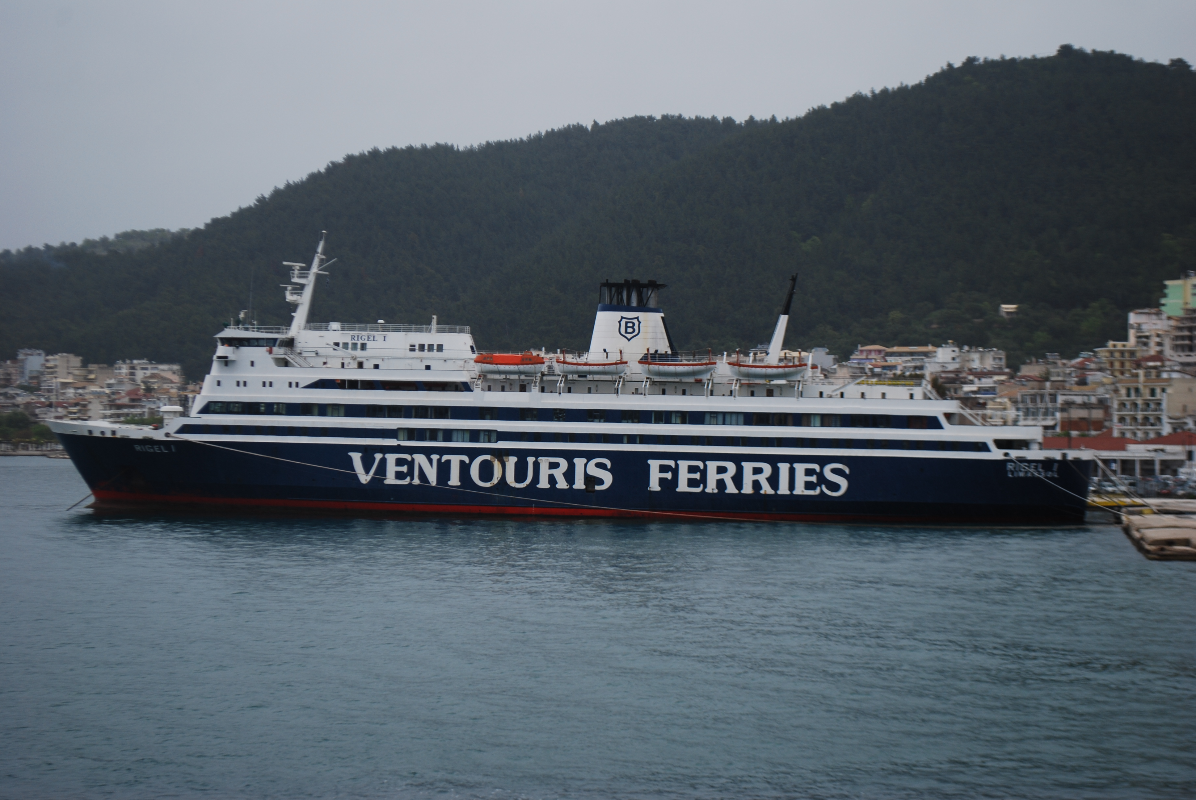 Vue de la traversée entre Igoumenitsa et Corfou, à bord du ferry Agios Panteleimon.